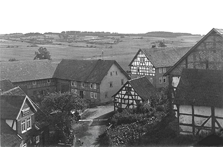 Fachwerkhäuser in Crainfeld um 1930